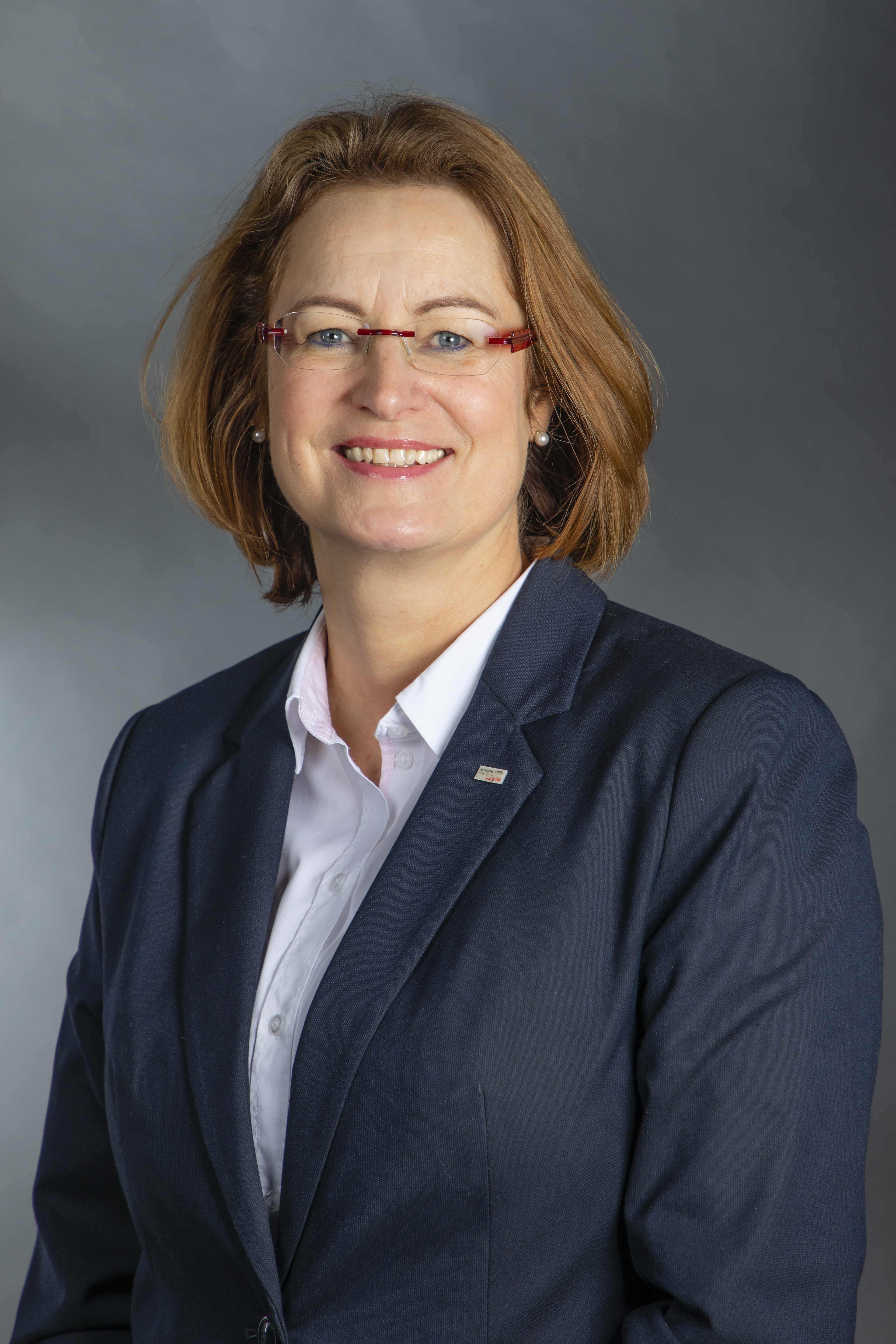 Antje Grotheer